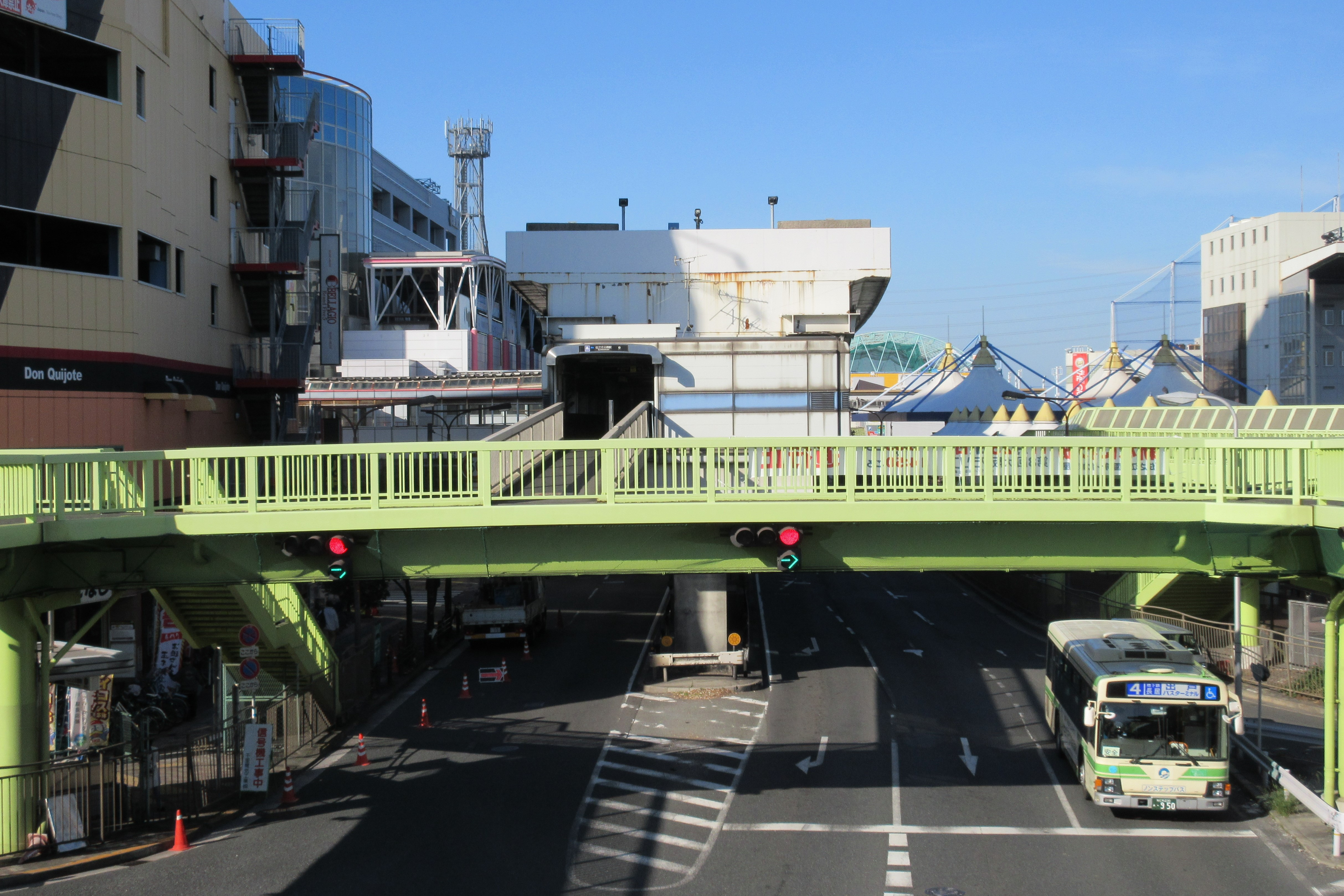 大阪市高速電気軌道（Osaka Metro）住之江公園駅